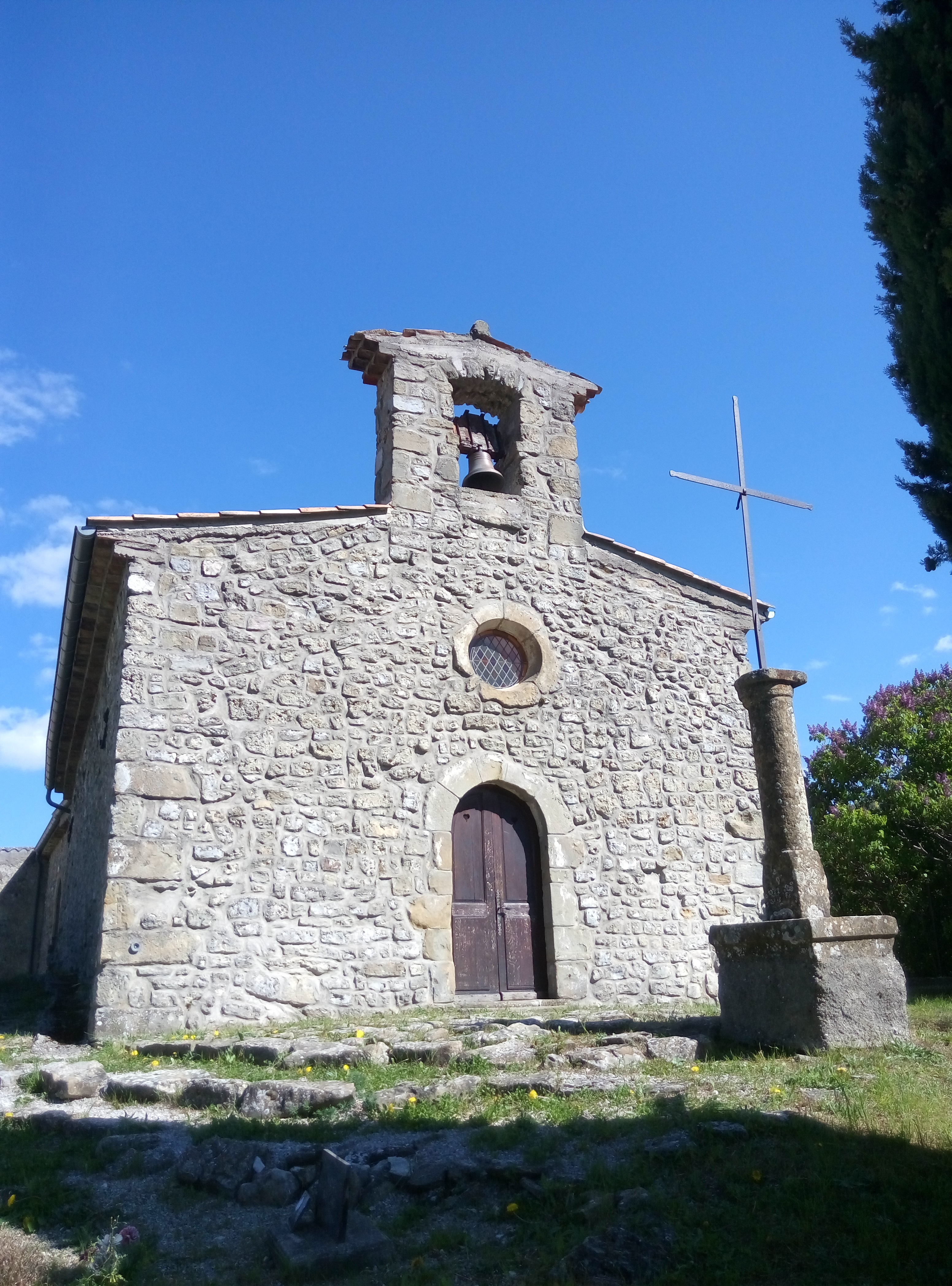 Église de La Chaudière, dans la Drôme.